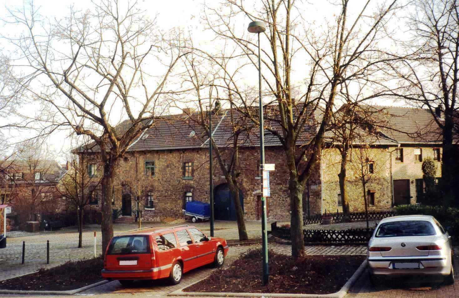 "Rinkensplatz" in Röhe